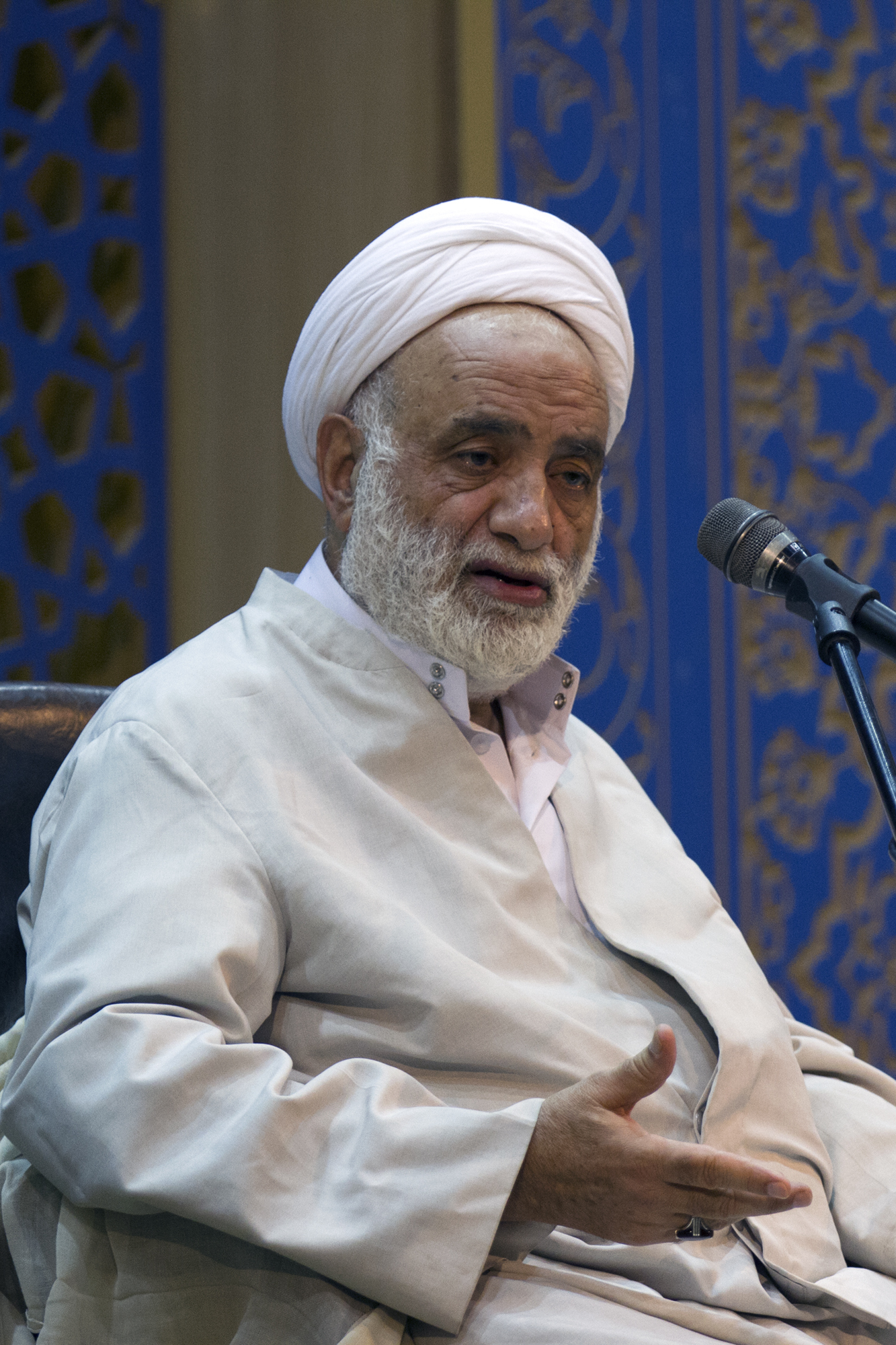 محسن قرائتی (زادهٔ ۱۳۲۴ در کاشان) مسئولیت نهاد «ستاد اقامه نماز» را بر عهده دارد. وی در اردیبهشت سال ۱۳۶۱ به «نمایندگی ولی فقیه» در سازمان نهضت سوادآموزی منصوب شد و سپس ریاست این سازمان را نیز بر عهده گرفت که این مسئولیت را تا اسفند ۱۳۸۹ داشت. وی در زمینه تفسیر قرآن به سبک مخصوص به خود فعالیت دارد.